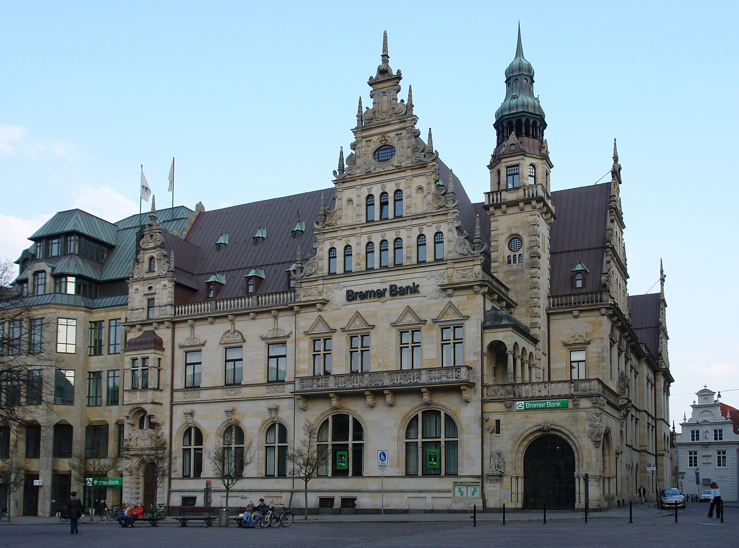 Bremer Bank (historischer Teil) neben dem Petri-Dom Das abgebildete Objekt ist ein geschütztes Kulturdenkmal in der Freien Hansestadt Bremen, mit der Nr. 0318 beim Landesamt für Denkmalpflege registriert.